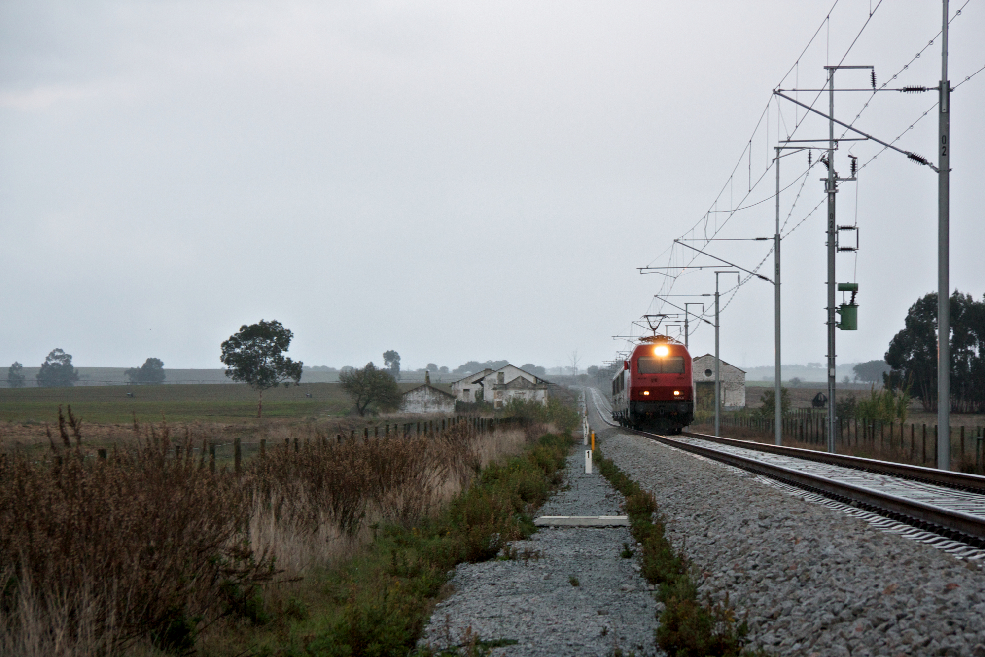 Tipo: Comboio Intercidades 696 [Évora - Lisboa • Oriente] Local: Tojal [Linha de Évora , PK 102] Data e hora: 22 de Novembro de 2011 [17h00] Material: Locomotiva 5616 + 3 carruagens Corail